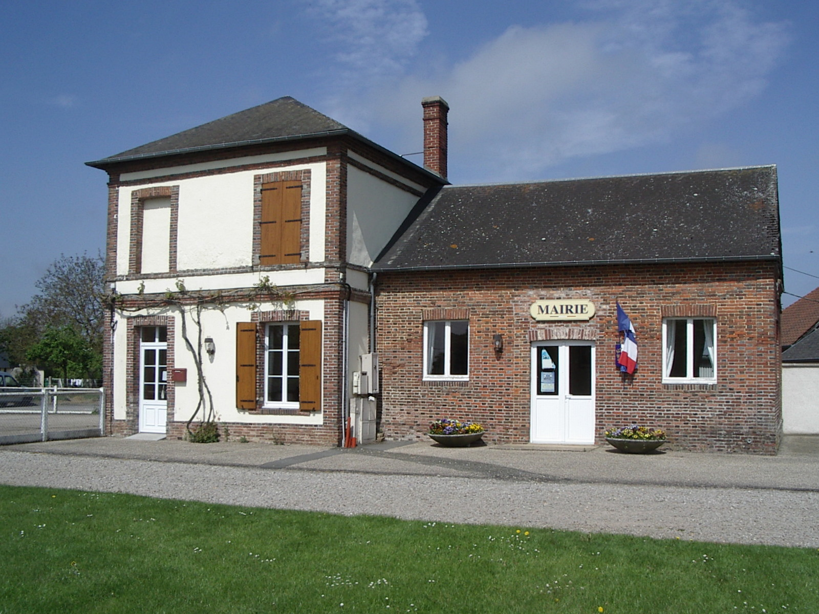 Mairie de Jonquerets-de-Livet (France, Eure)